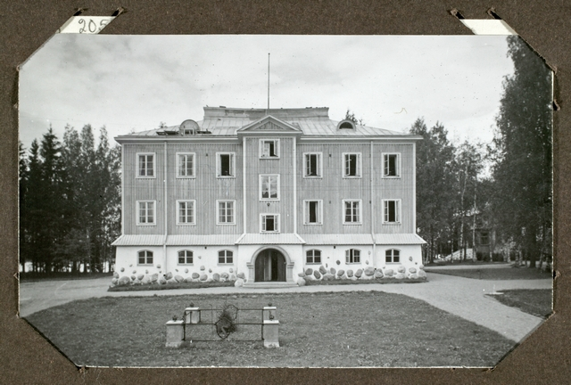 Kuvassa oleva Päällystökoulun opintorakennus otettiin virallisesti käyttöön 18.8.1925 Tasavallan Presidentti Lauri Kr. Relanderin kunnioittaessa tilaisuutta läsnäolollaan. Kuvan etualalla on kesällä 1928 Norjan Kuningas Haakonin vierailun muistoksi istutettu muistokuusi kiviaitauksineen.